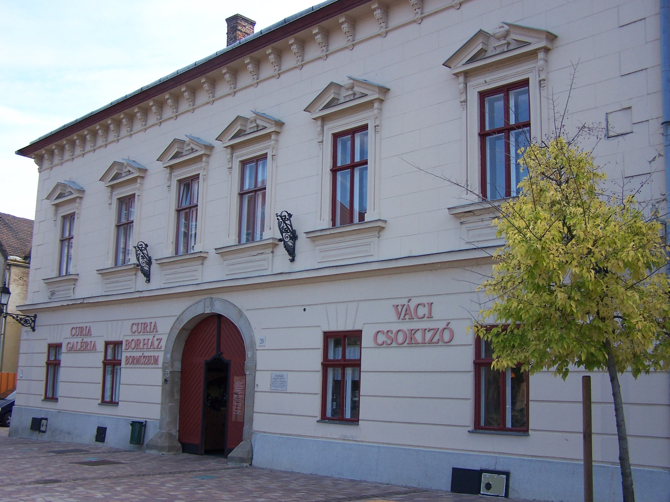 Curia szálló (Vác, Március 15. tér 20.) This is a photo of a monument in Hungary, Identifier: 7540